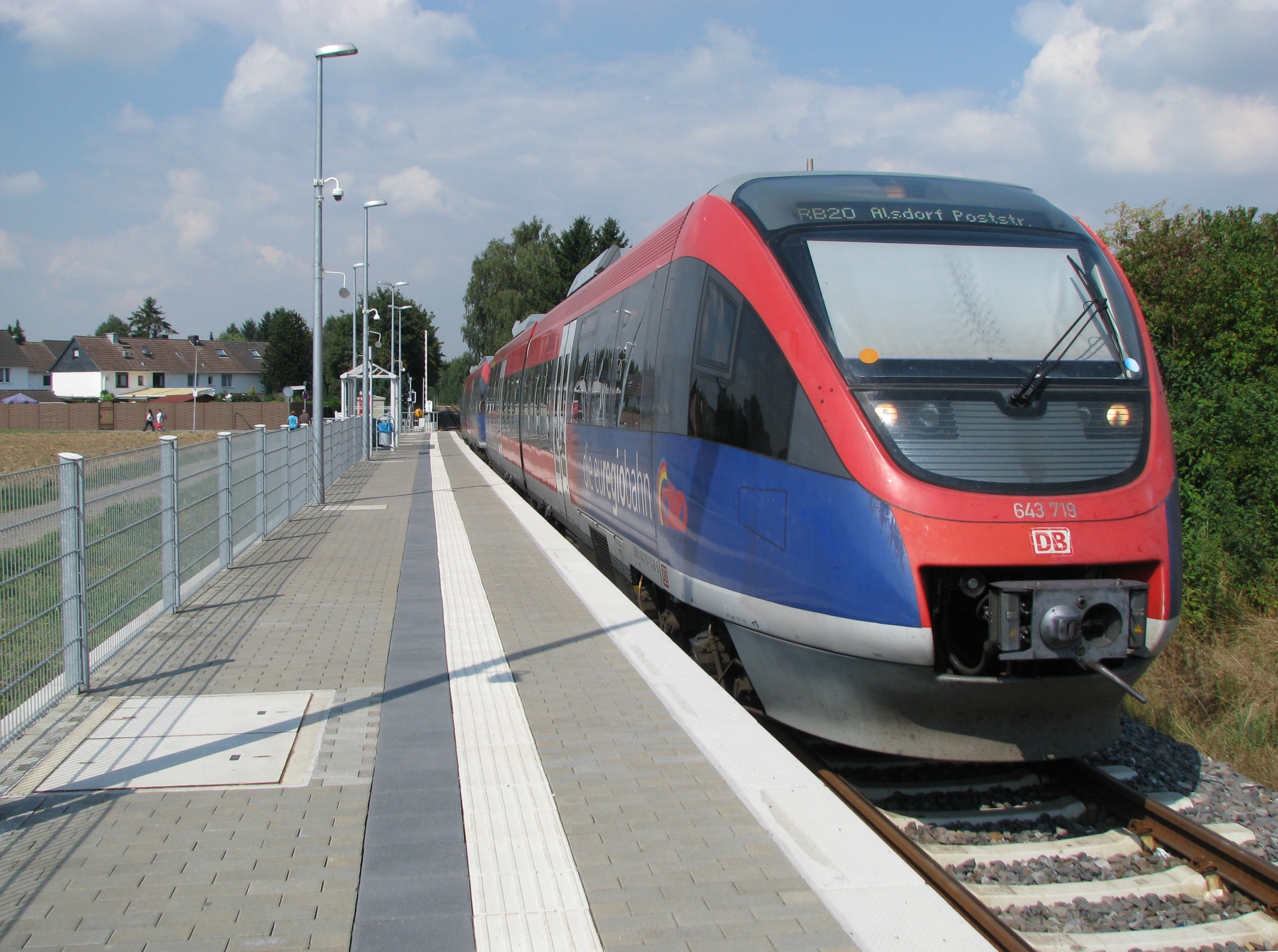 Haltepunkt Alsdorf Poststraße mit zwei Bombardier Talent BR 643.2 der Euregiobahn an der Bahnstrecke Stolberg–Herzogenrath.